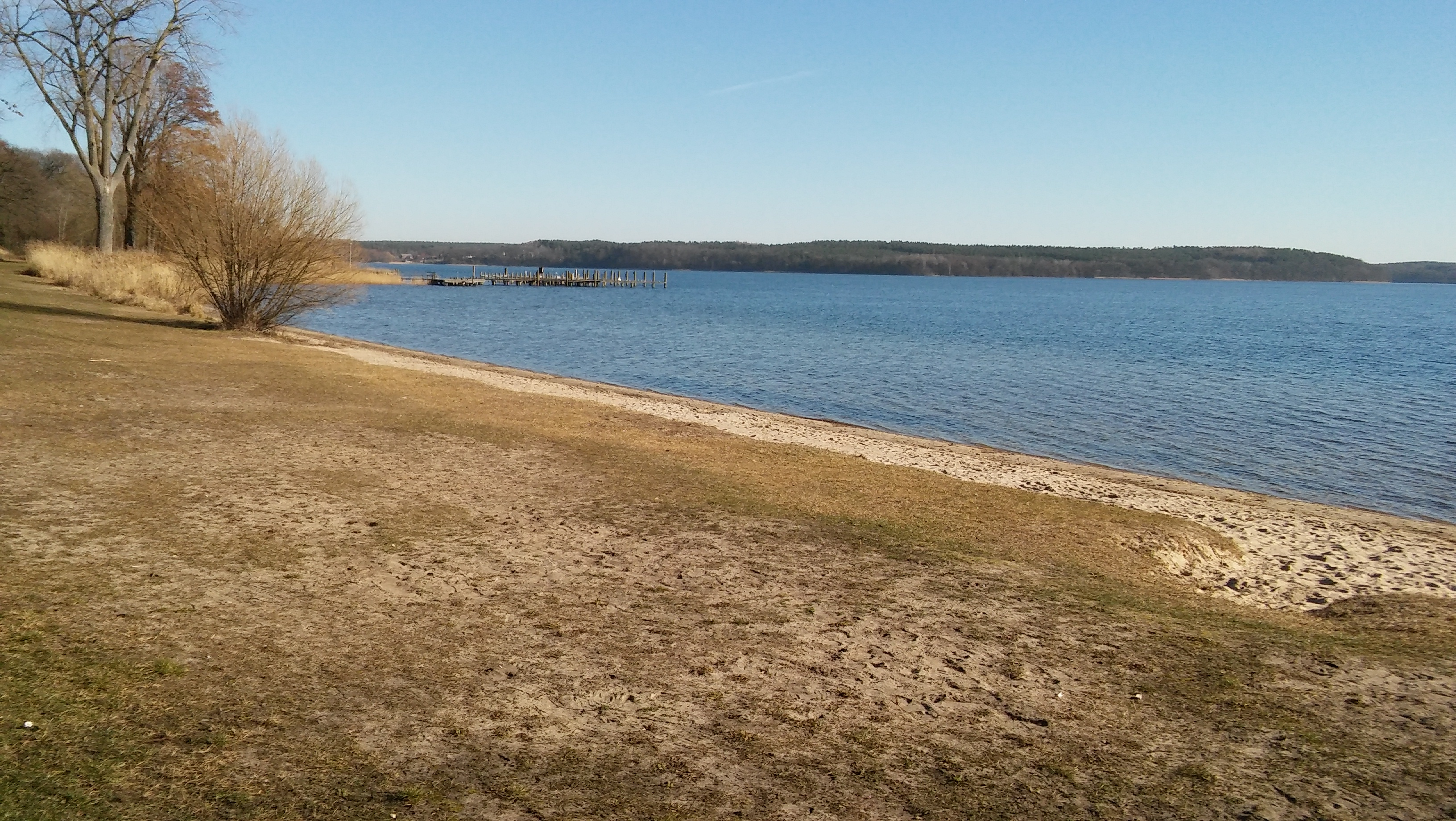 Plauer See bei Seelust